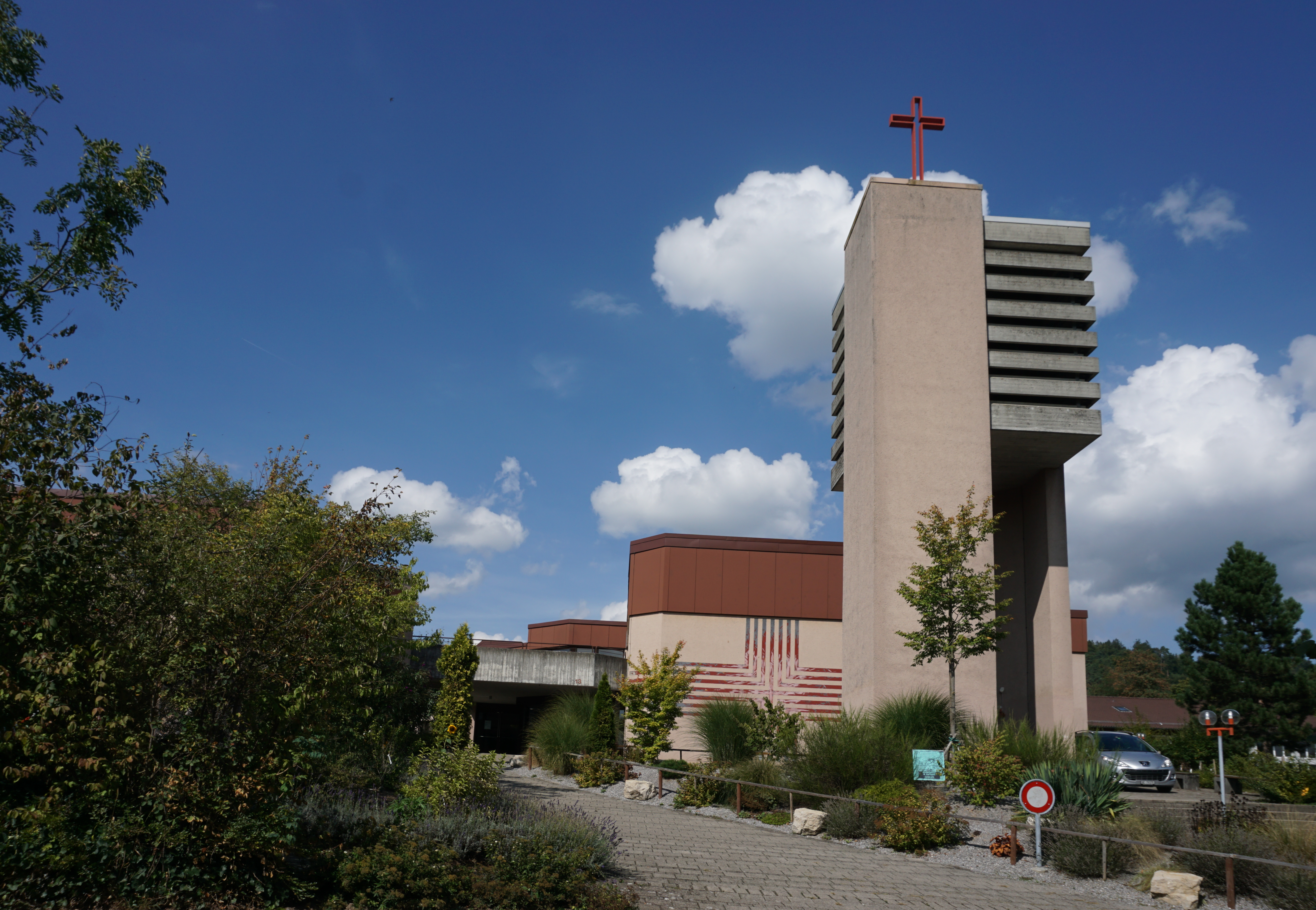 Ökumenisches Zentrum der evangelisch reformierten Kirche Ittigen und der römisch katholischen Kirche Peter und Paul Ittigen